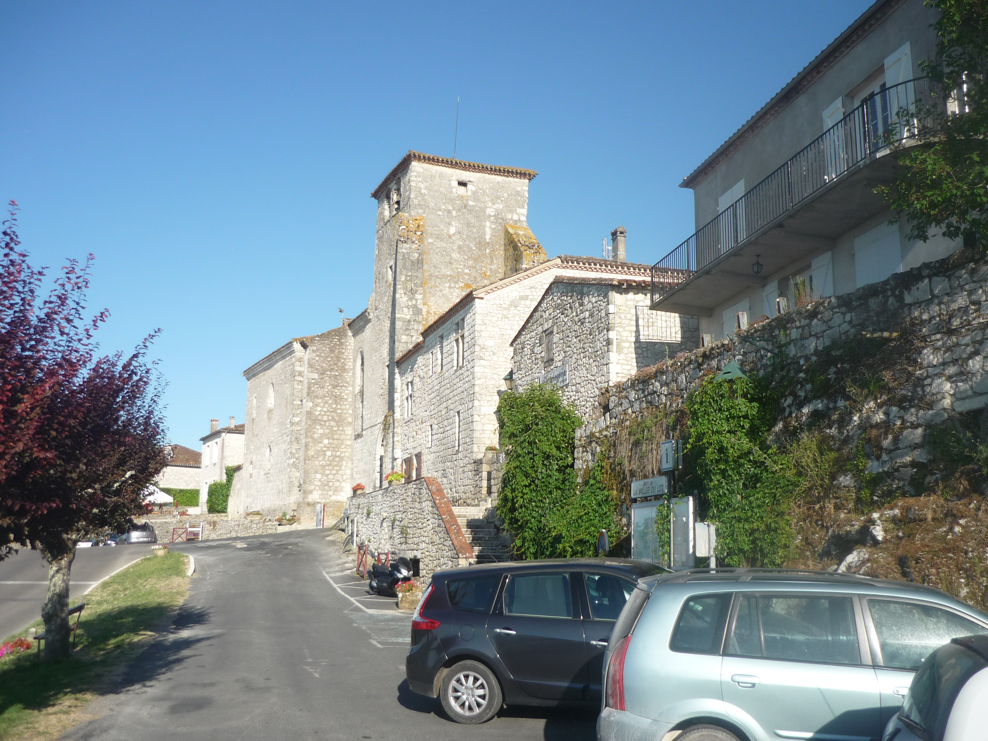 Vue de Pujols-le-Haut.